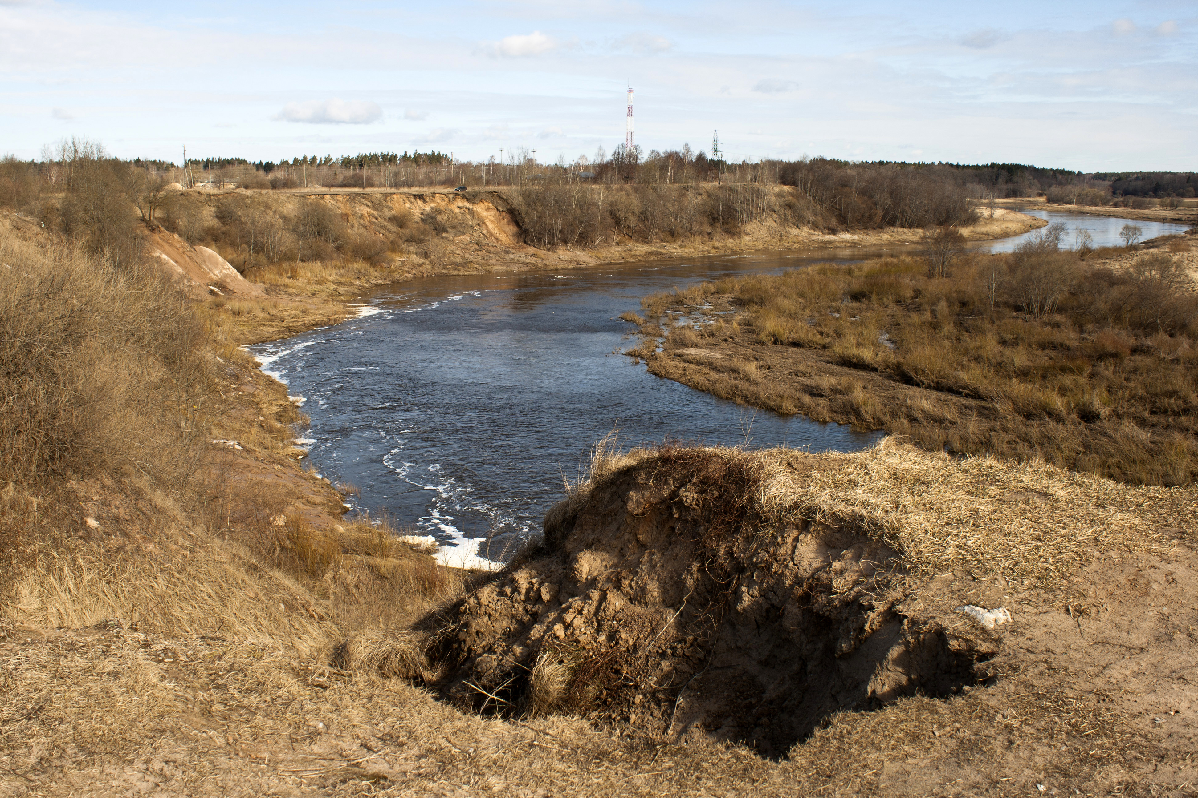 Venta near Kuldīga